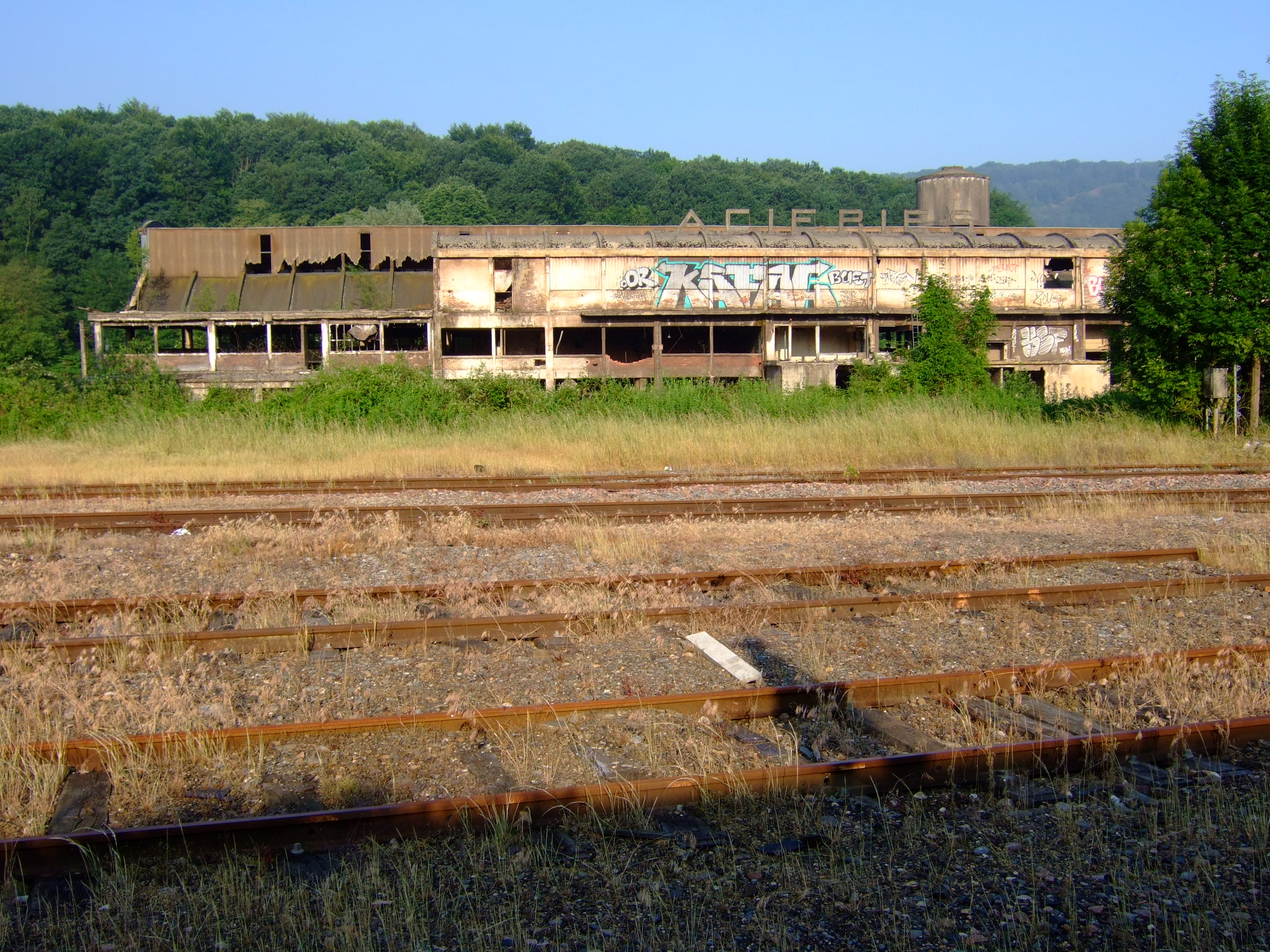 Voies de la gare de Nouzonville au printemps 2008, en arrière plan lesruines de l'usine Thomé-genot .